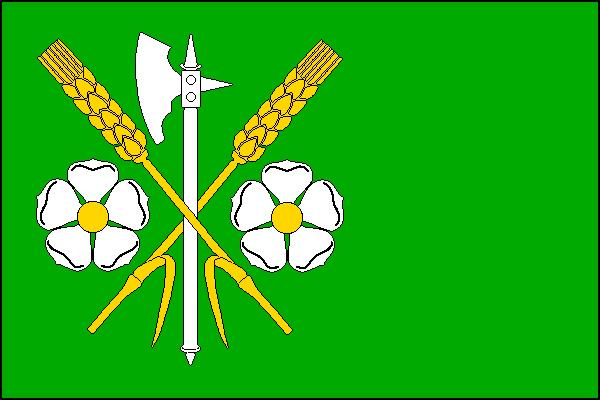 Vlajka obce Křešice